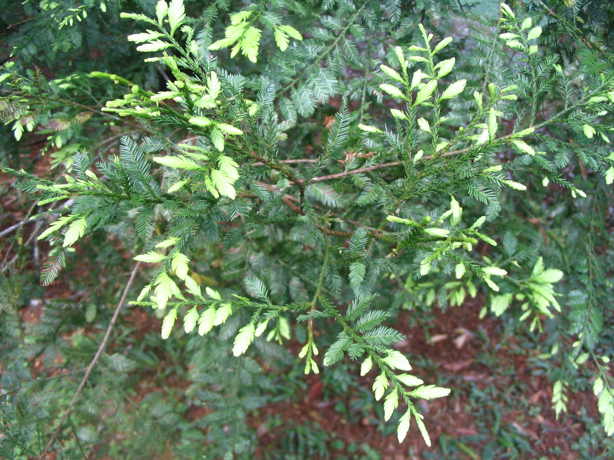 Dacrycarpus imbricatus, feuilles - planté au Forest Research Institute Malaysia , Kepong, Selangor